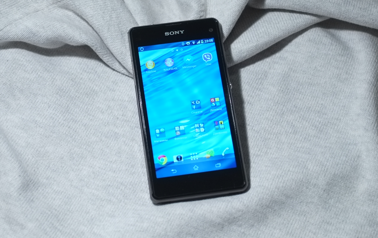 Sony Xperia Z1 Compact